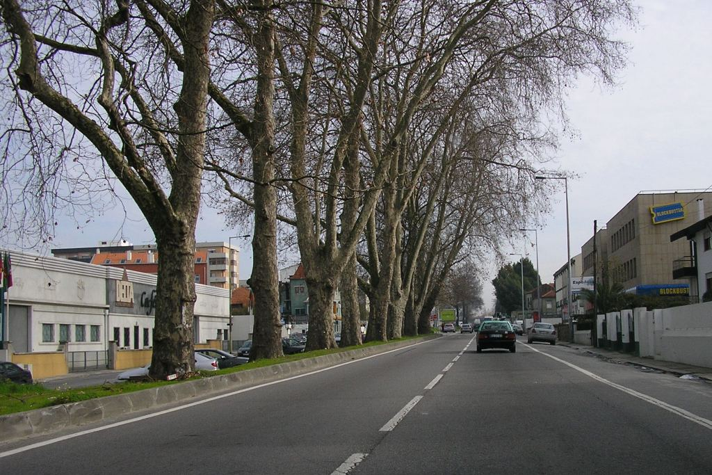 Carretera N12, "circunvalación" de Oporto, hoy convertida en bulevar, Portugal.